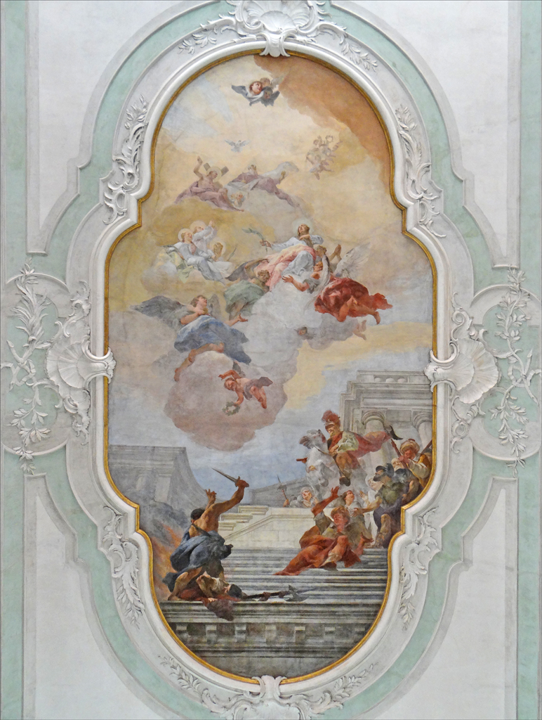 Gloire de Sainte Euphémie / Sant'Eufemia in glory 1764 Oeuvre de Giambattista Canal (1745-1825), un suiveur de Tiepolo Eglise Sant'Eufemia, plafond de la nef centrale Giudecca Venise L'église Sant'Eufemia a été fondée au IXè siècle sur l'île de la Giudecca à Venise Elle a été restaurée à plusieurs reprises, les travaux de décoration (stucs, peintures,..) réalisés au XVIIIè siècle y sont encore très visibles. L'église d'origine avait la forme traditionnelle d'une basiliques vénéto-byzantine, plusieurs colonnes et des chapiteaux datent de sa fondation. Elle comporte trois nefs qui sont orientées parallèlement au canal de la Giudecca. La façade possède un intéressant portique. Article de Wikipedia sur l'artiste